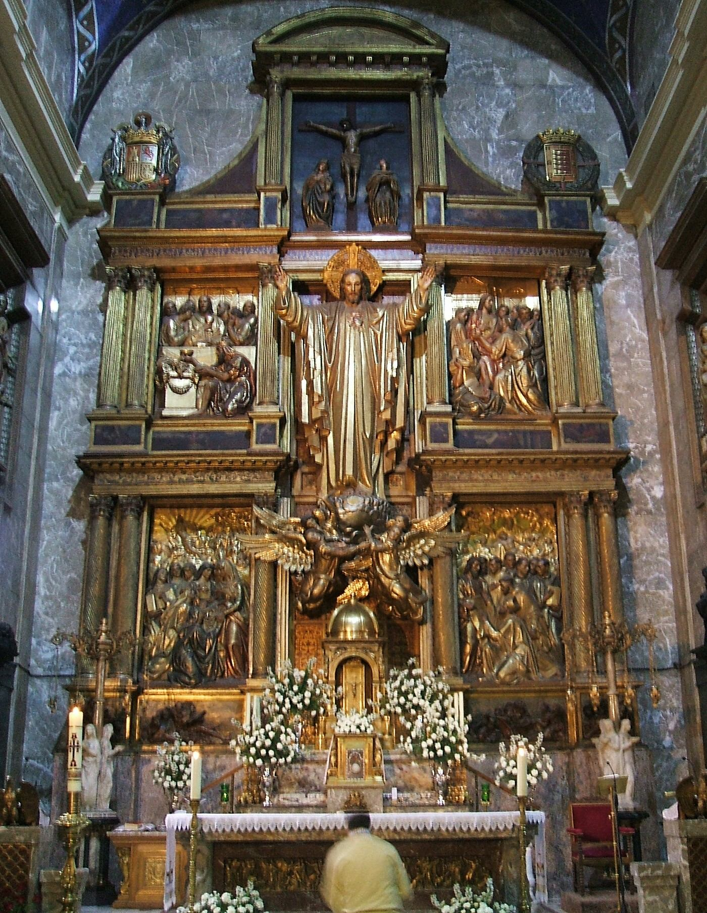 Retablo Mayor (siglos XVII y XX) de la Basílica Menor y Santuario Nacional de la Gran Promesa, en Valladolid, España/Spain